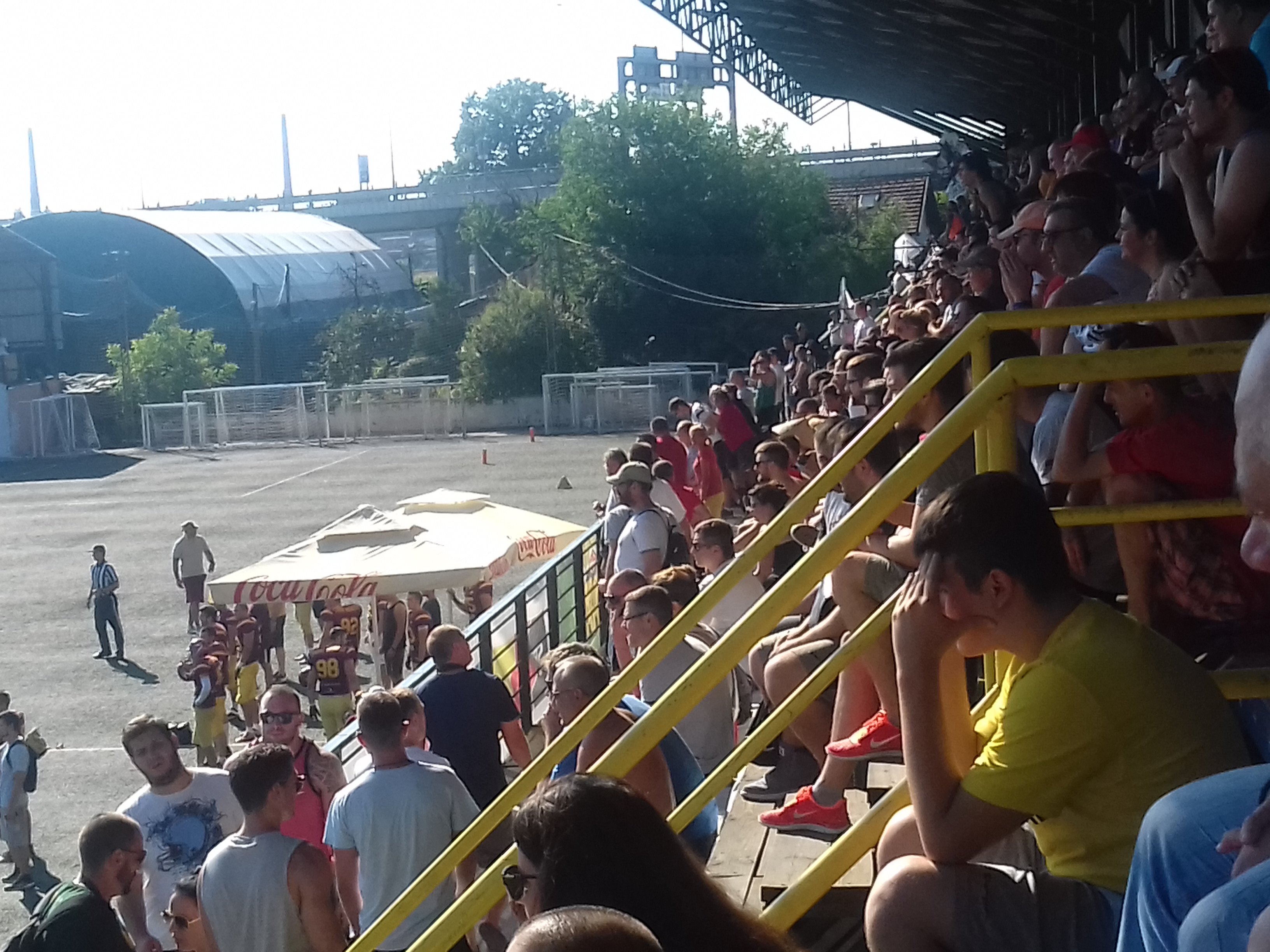 Српски (ћирилица): Сербијан боул 12 (Вукови-Дивљи вепрови)